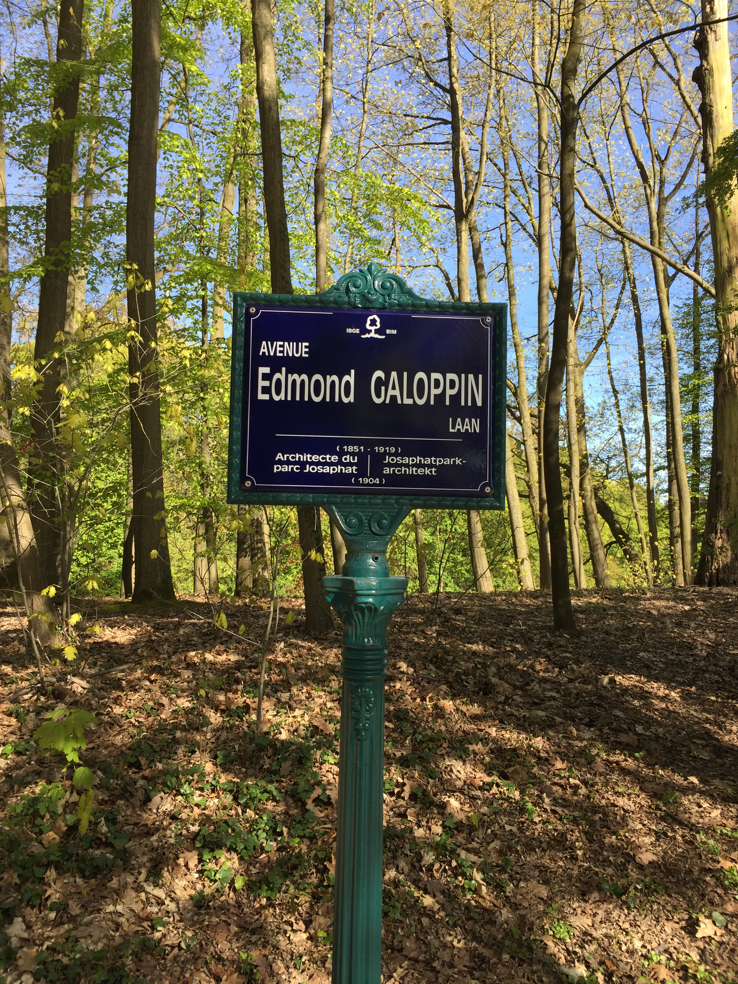 Edmond Gallopin